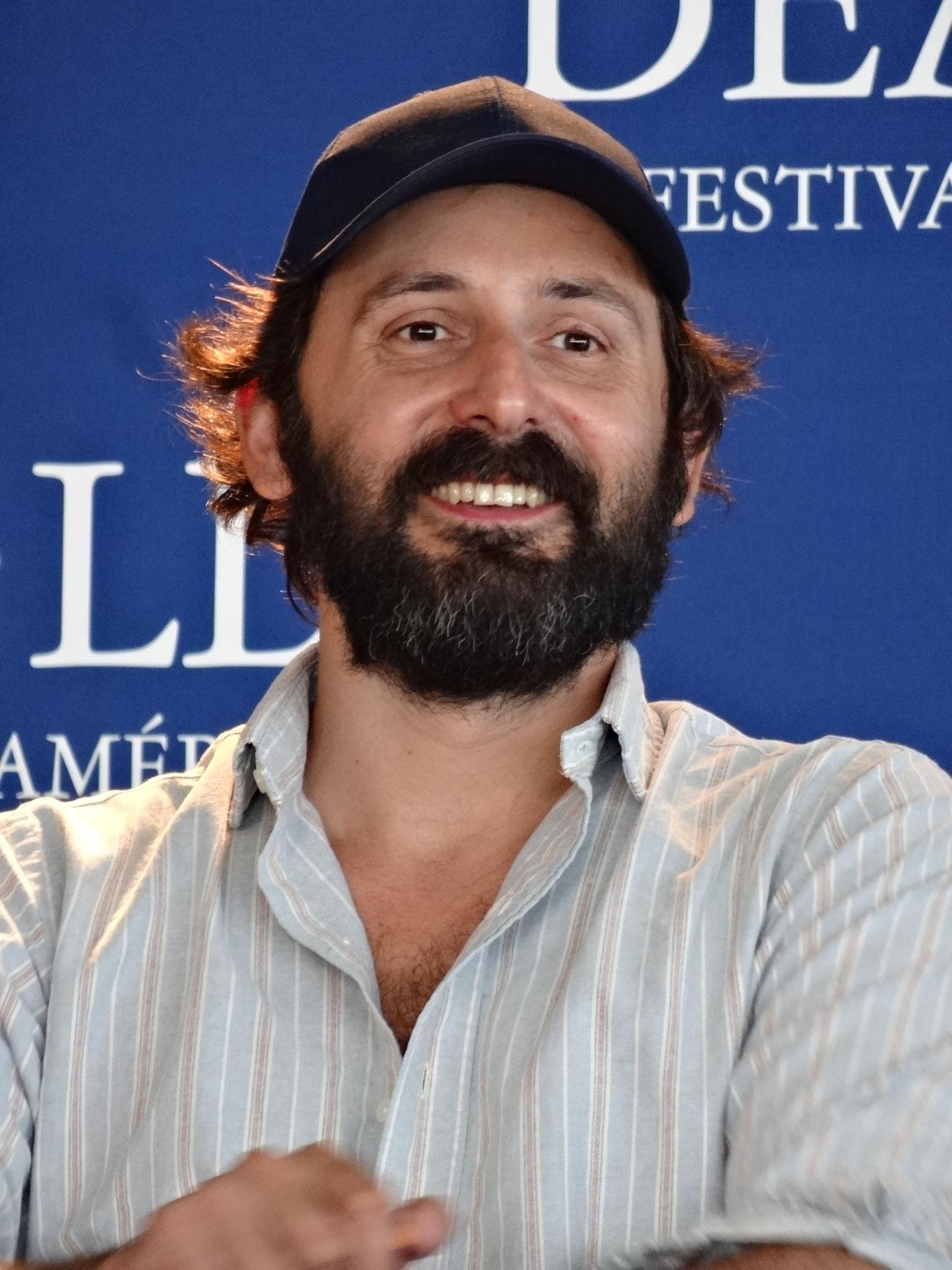 Festival Deauville 2012